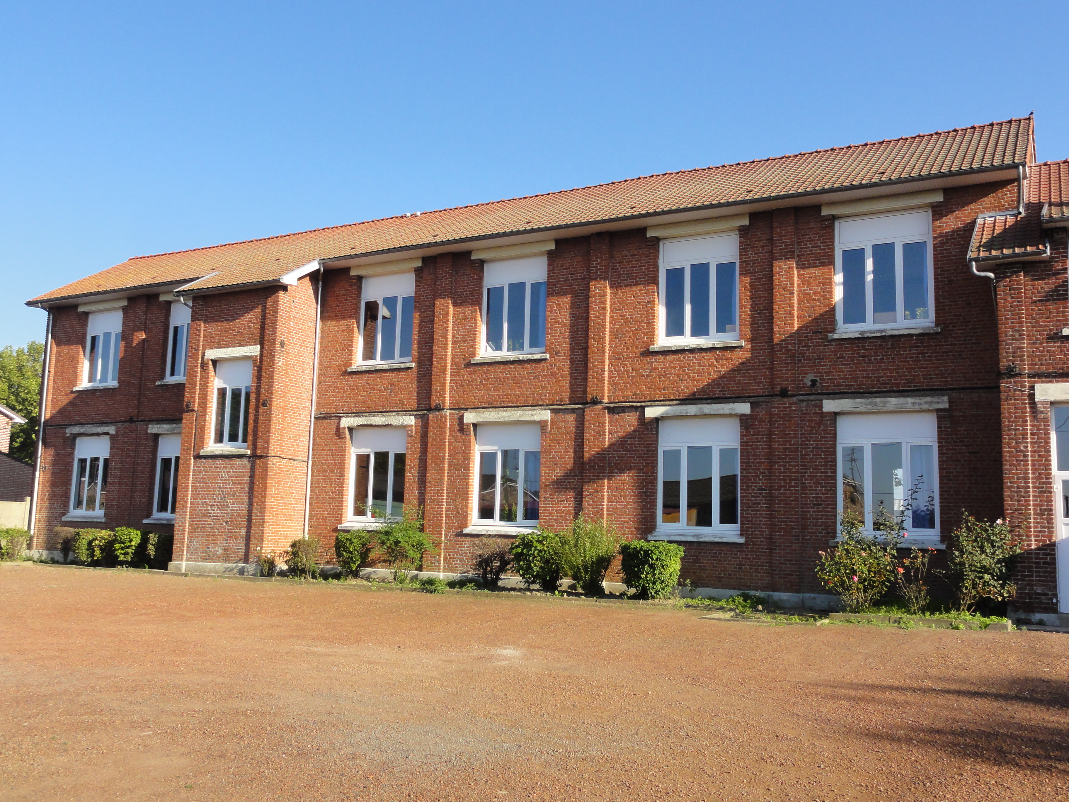 Écoles des cités de la Fosse n° 6 de la Compagnie des mines d'Ostricourt, Ostricourt, Nord, Nord-Pas-de-Calais, France.